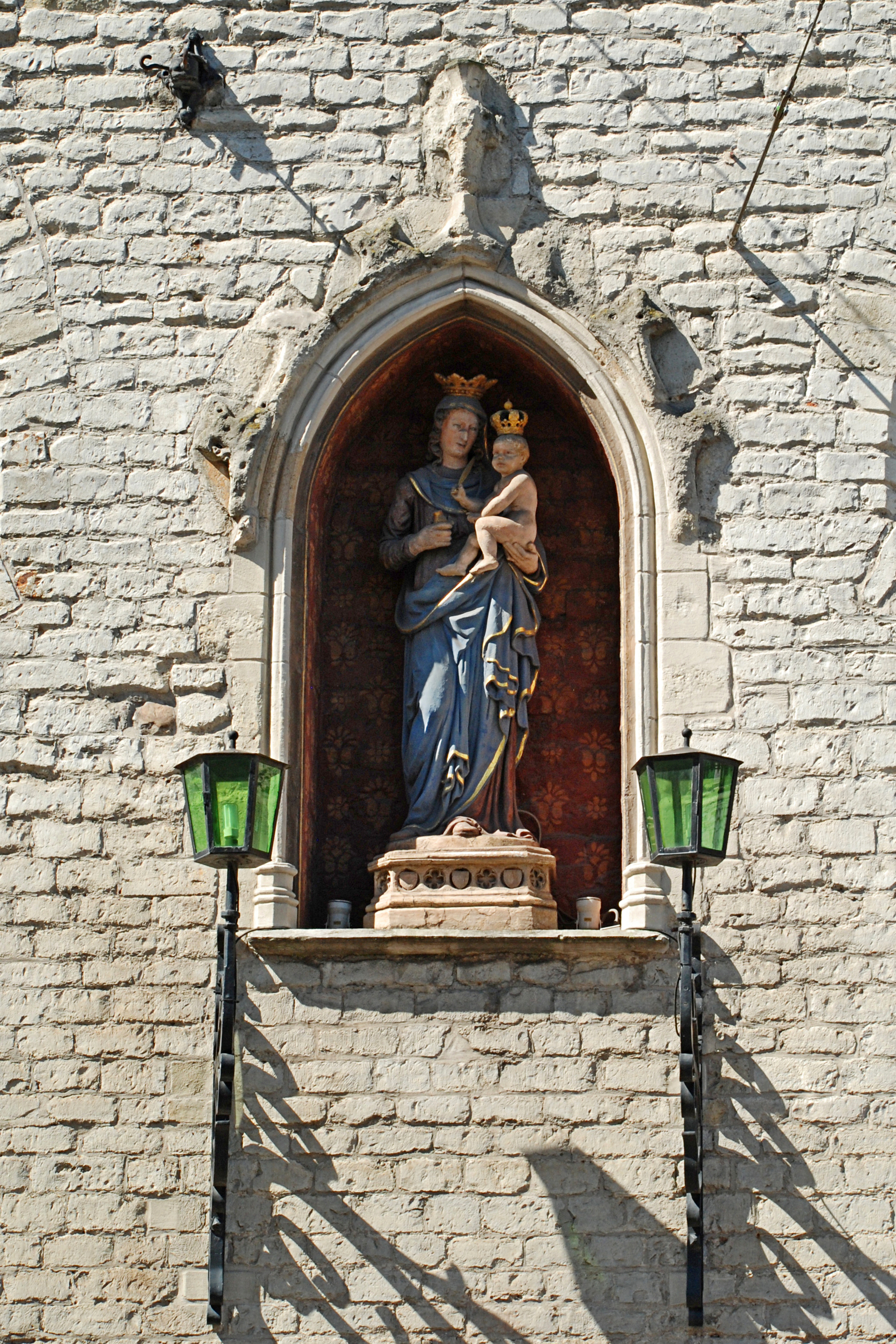 Belgique - Gand - Grande Boucherie (Groot Vleeshuis 1407-1419)